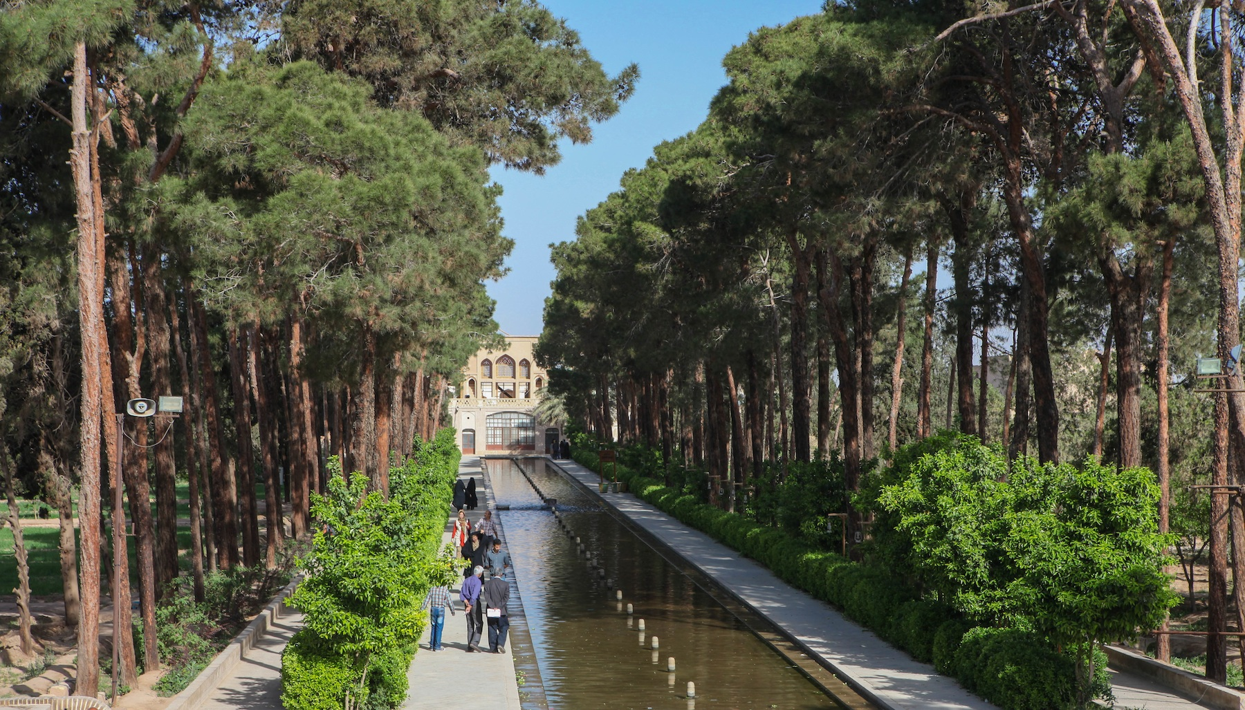 Dowlat Abad Garden, Yazd, Iran